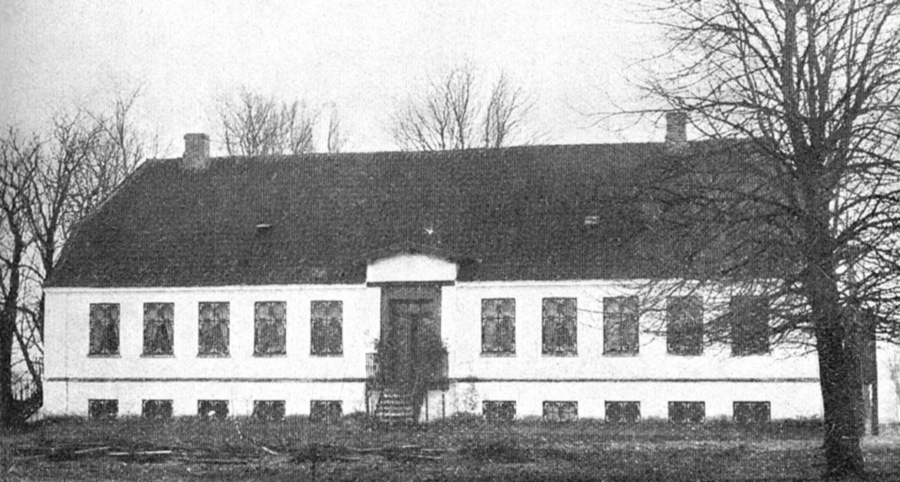 Vejlegård er en gammel hovedgård, som nævnes første gang i 1467, og er nu en avlsgård under Boltinggård Gods. Gården ligger i Vejle Sogn, Sallinge Herred, Broby Kommune. Hovedbygningen er opført i 1854.